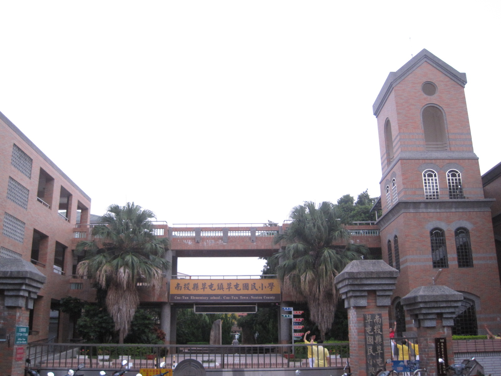 南投縣草屯鎮草屯國小大門